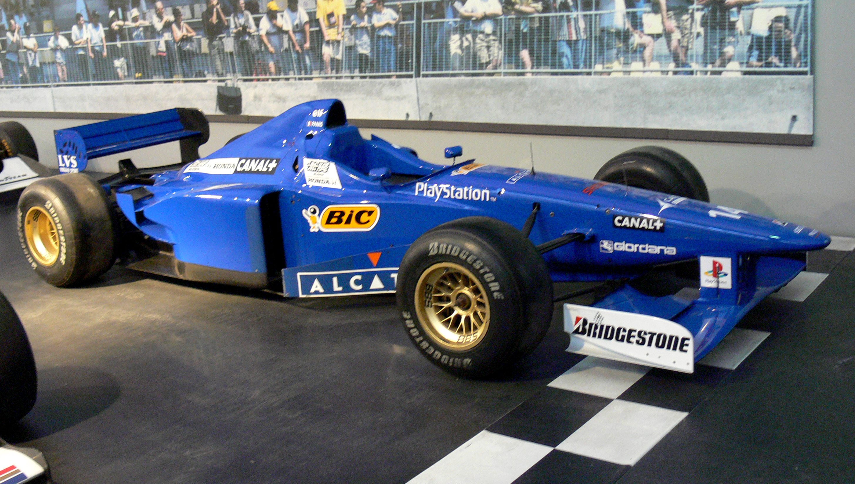 Prost Mugen-Honda JS45 der Saison 1997 im Musée National de l'Automobile (Mulhouse)